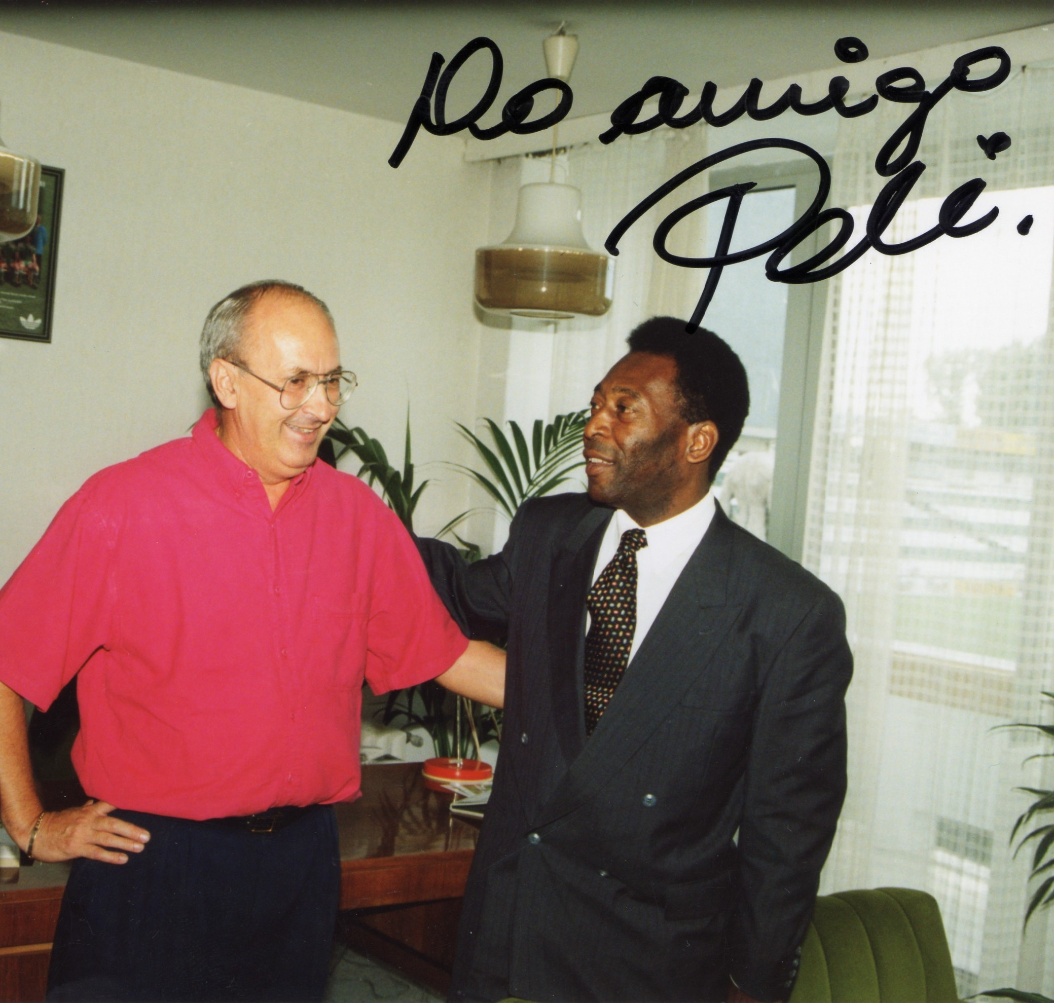 Pele az Üllöi úti Stadionban